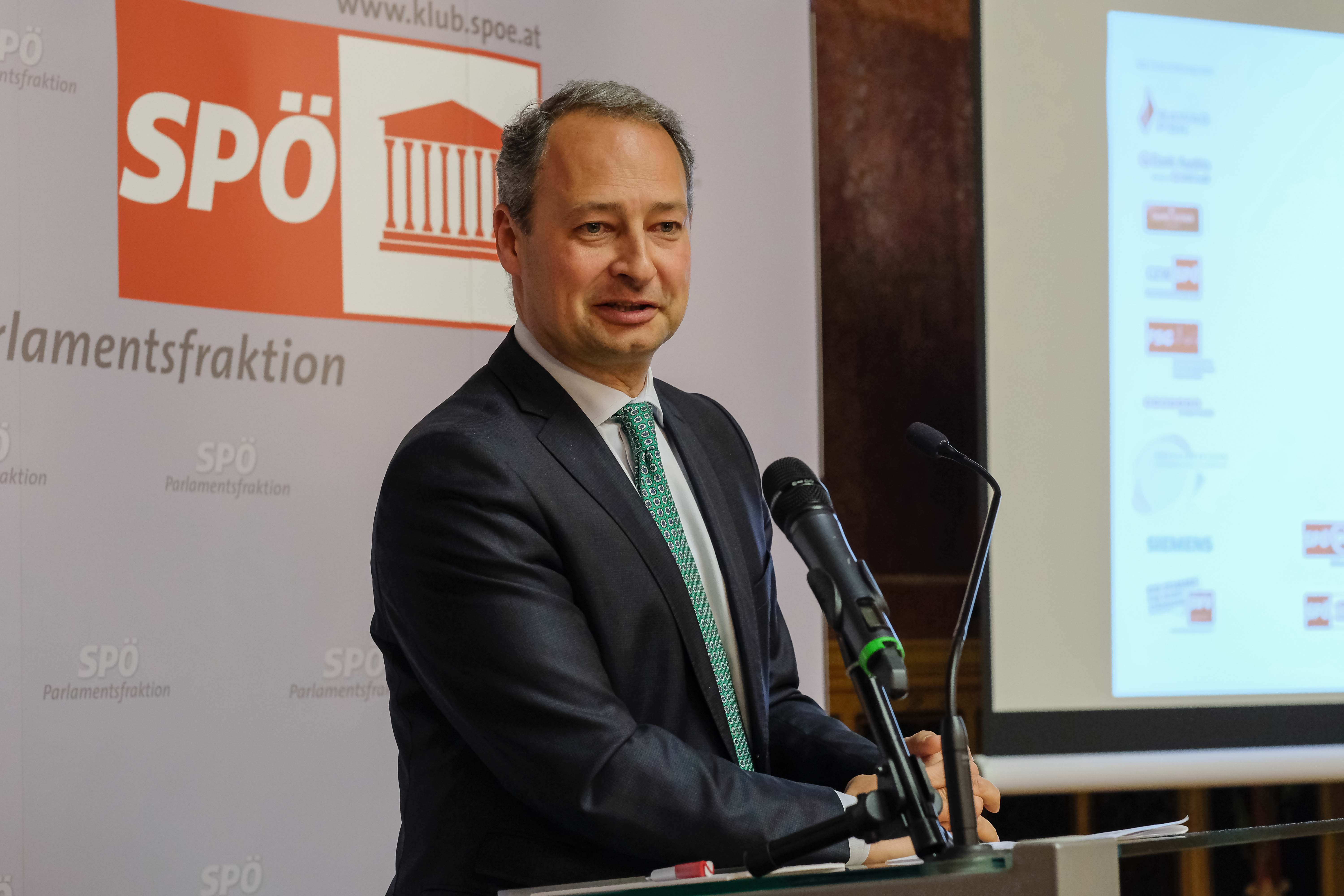 Foto: Walter Henisch Verleihung des Bruno-Kreisky-Preis für das Politische Buch 2015